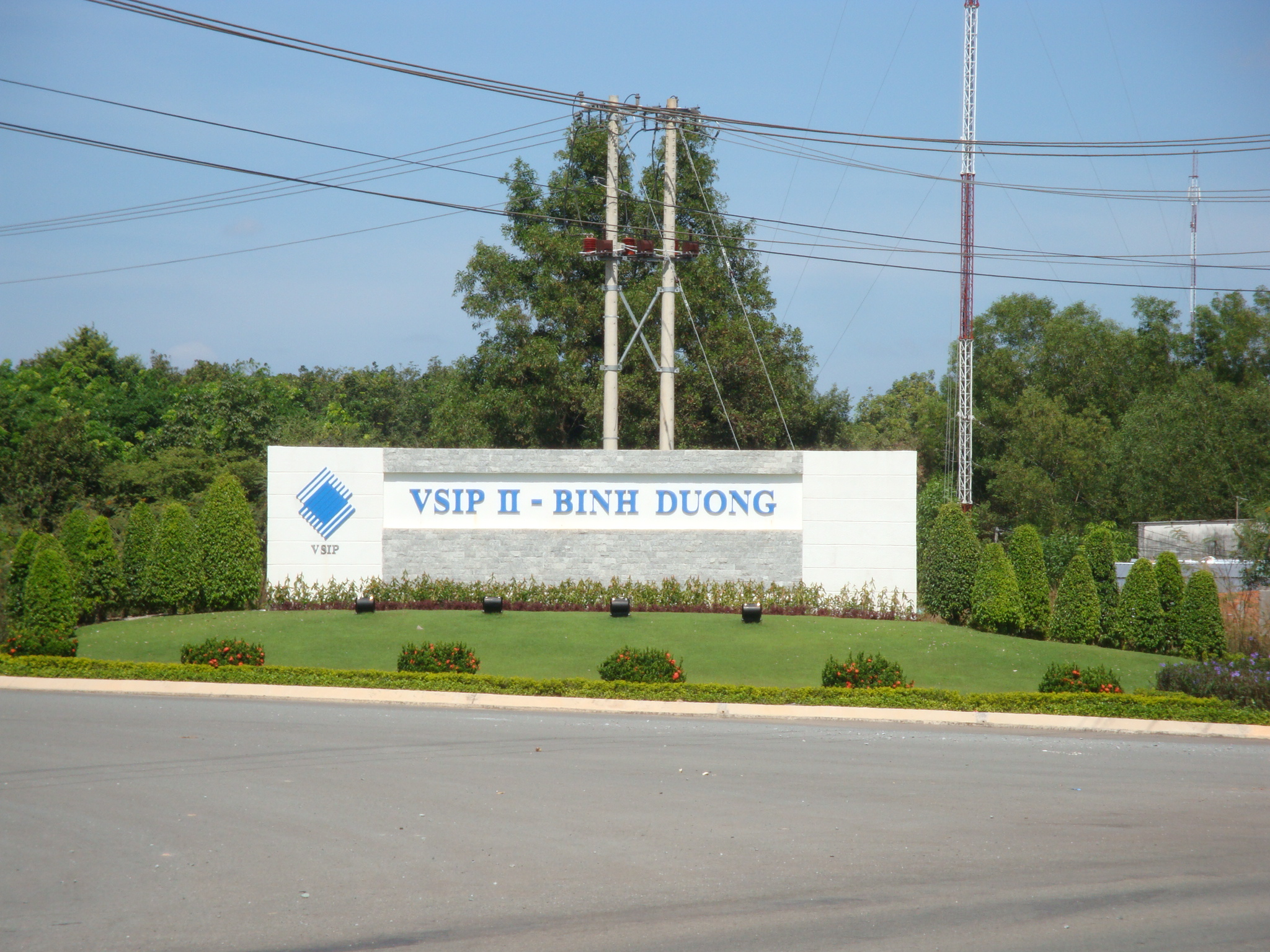 Vĩnh Tân, Tân Uyên, Bình Dương, Việt Nam